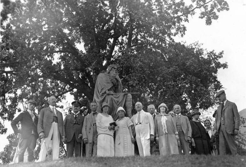 Polarfahrt mit dem Dampfer "München".- Gruppe am König Bele-Denkmal [Bergen] 17. Juli - 12. August 1925